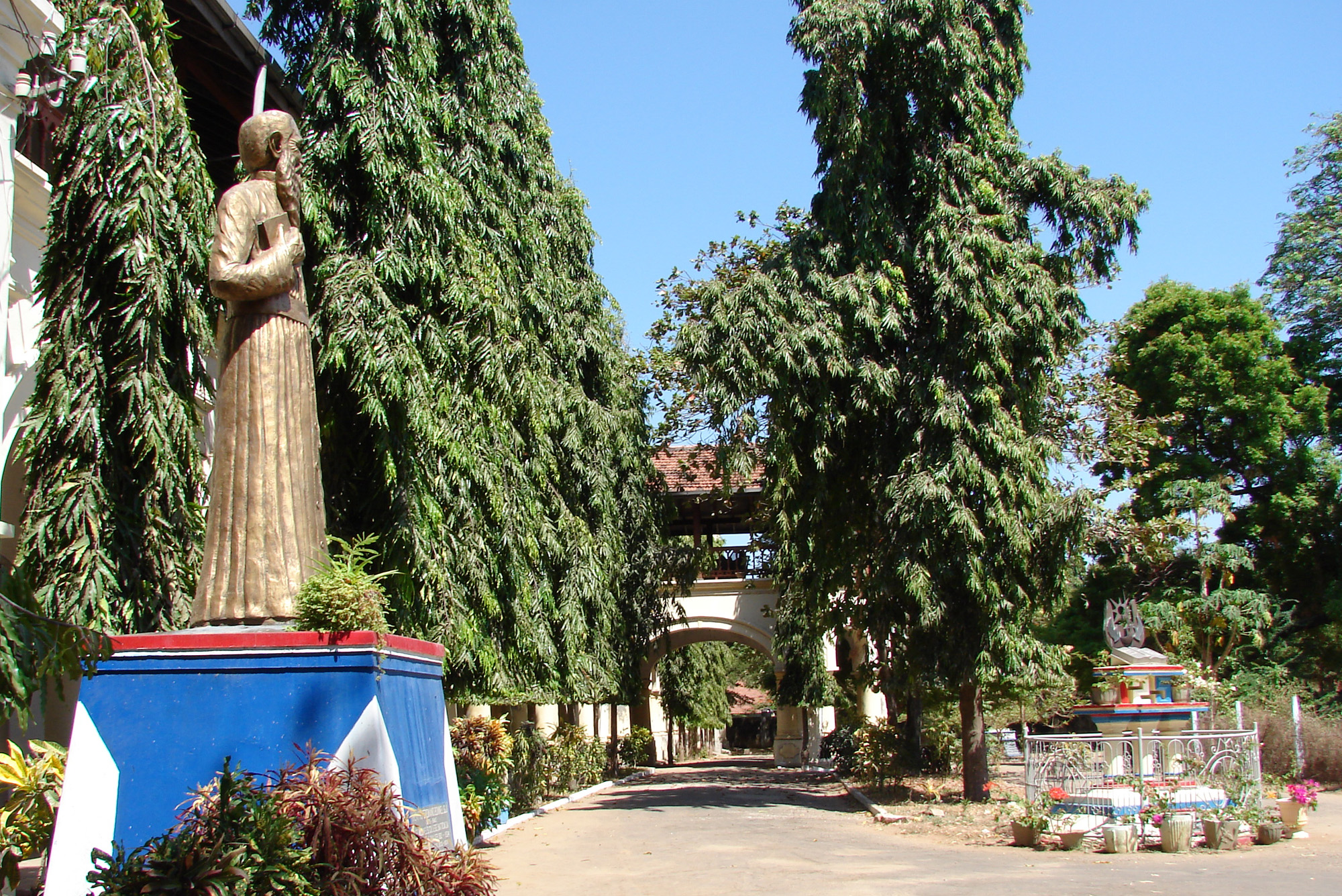 மட்டக்களப்பு புனித மிக்கேல் கல்லூரி வாளாகத்திலுள்ள நிறுவனரின் சிலை